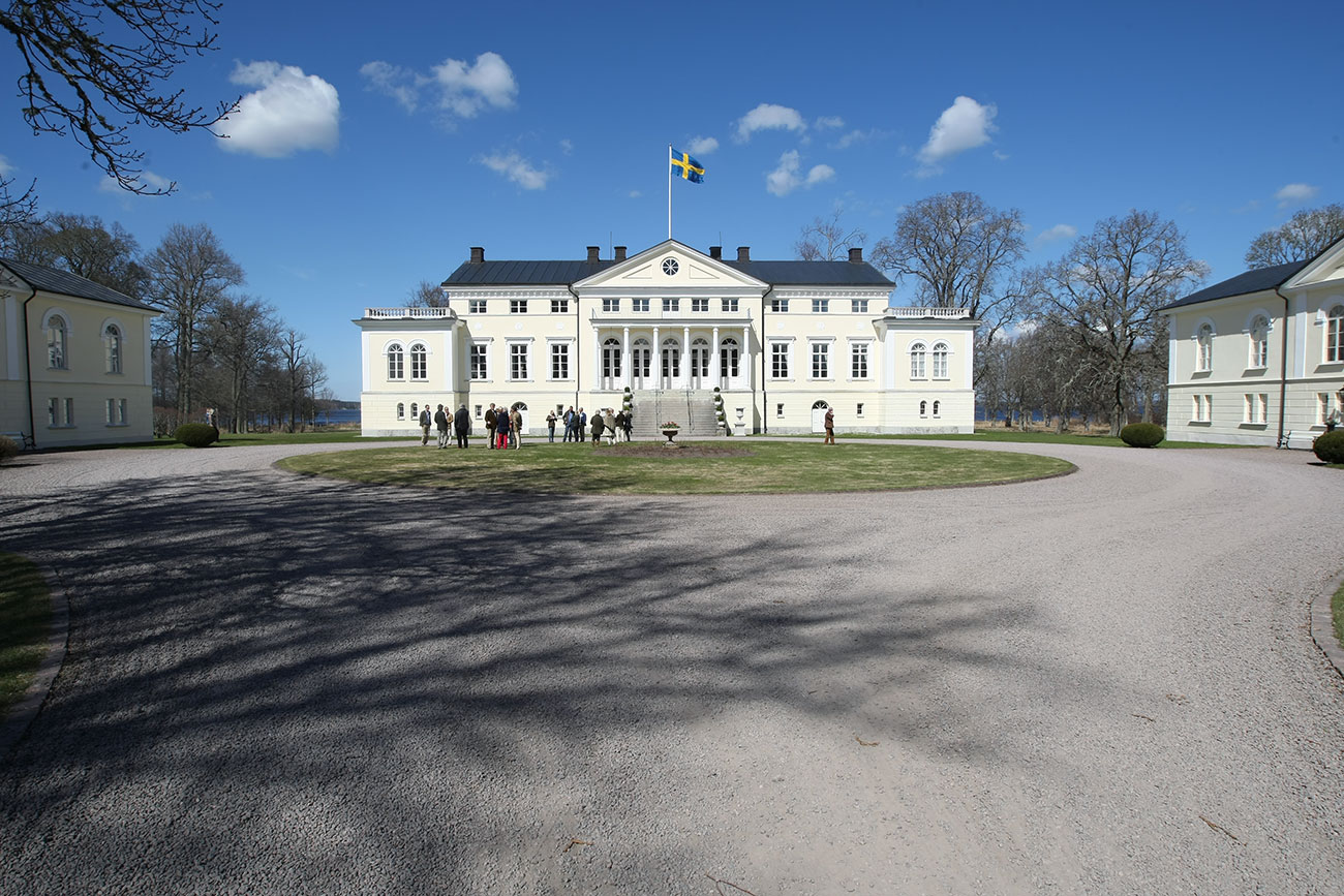 Ryholms herrgård sida mot gårdsplan.